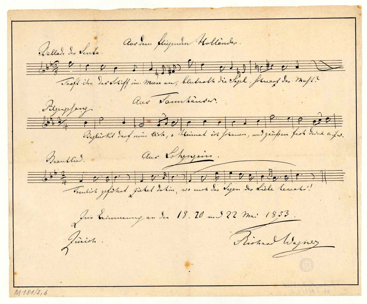 gedrucktes Erinnerungsblatt an Mitwirkende der Zürcher Wagner-Konzerte 1853, Ausschnitt aus Der Fliegende Holländer, Tannhäuser und der Sängerkrieg auf Wartburg, Lohengrin. Text: Aus dem fliegenden Holländer. Ballade der Senta. "Traft ihr das Schiff im Meere an, blutrot die Segel, schwarz der Mast?" [2. Aufzug] Aus Tannhäuser. Pilgergesang. "Beglückt darf nun dich, o Heimat, ich schauen und grüßen froh deine usw." [3. Aufzug] Lohengrin. Brautlied. "Treulich geführt ziehet dahin, wo euch der Segen der Liebe bewahr!" [3. Aufzug] Zur Erinnerung an den 18, 20 und 22 Mai 1853. Zürich. Richard Wagner